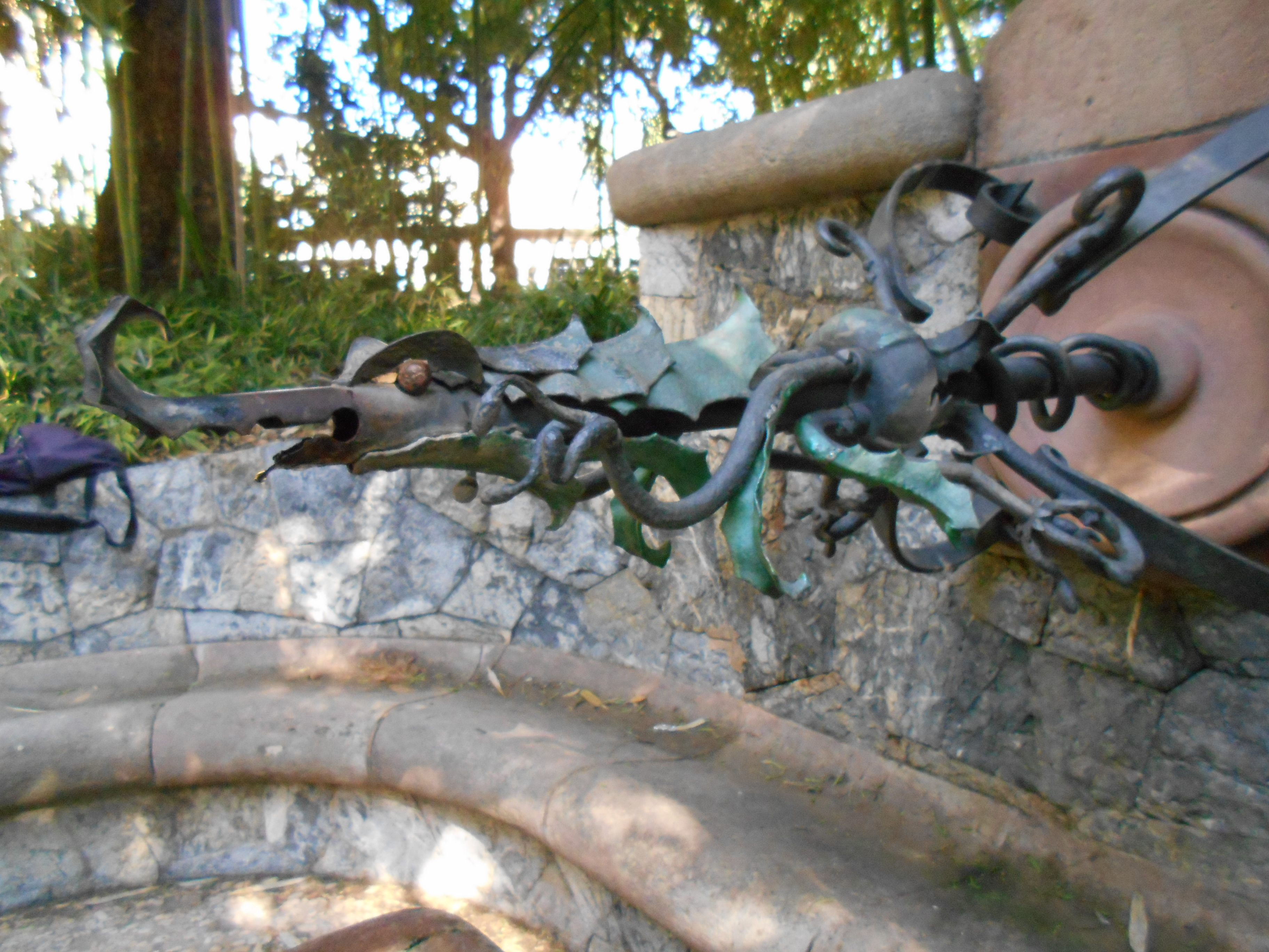 Boca de la Fuente de Hércules, de Antoni Gaudí.